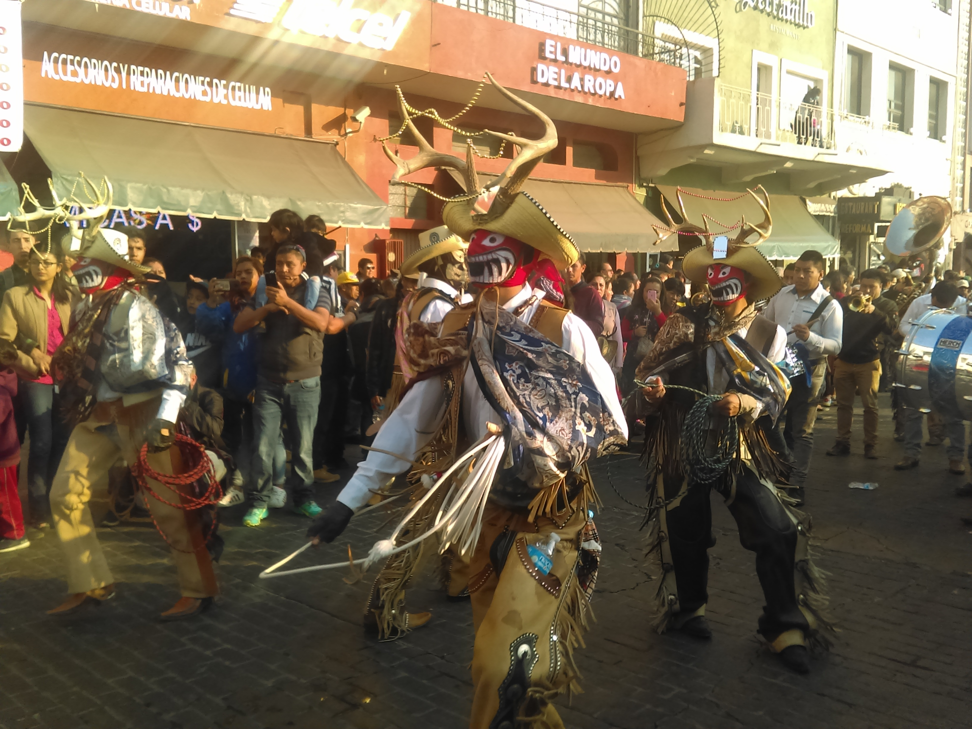 Desfile "Magia de los Carnavales de Hidalgo" en Pachuca de Soto (2020).